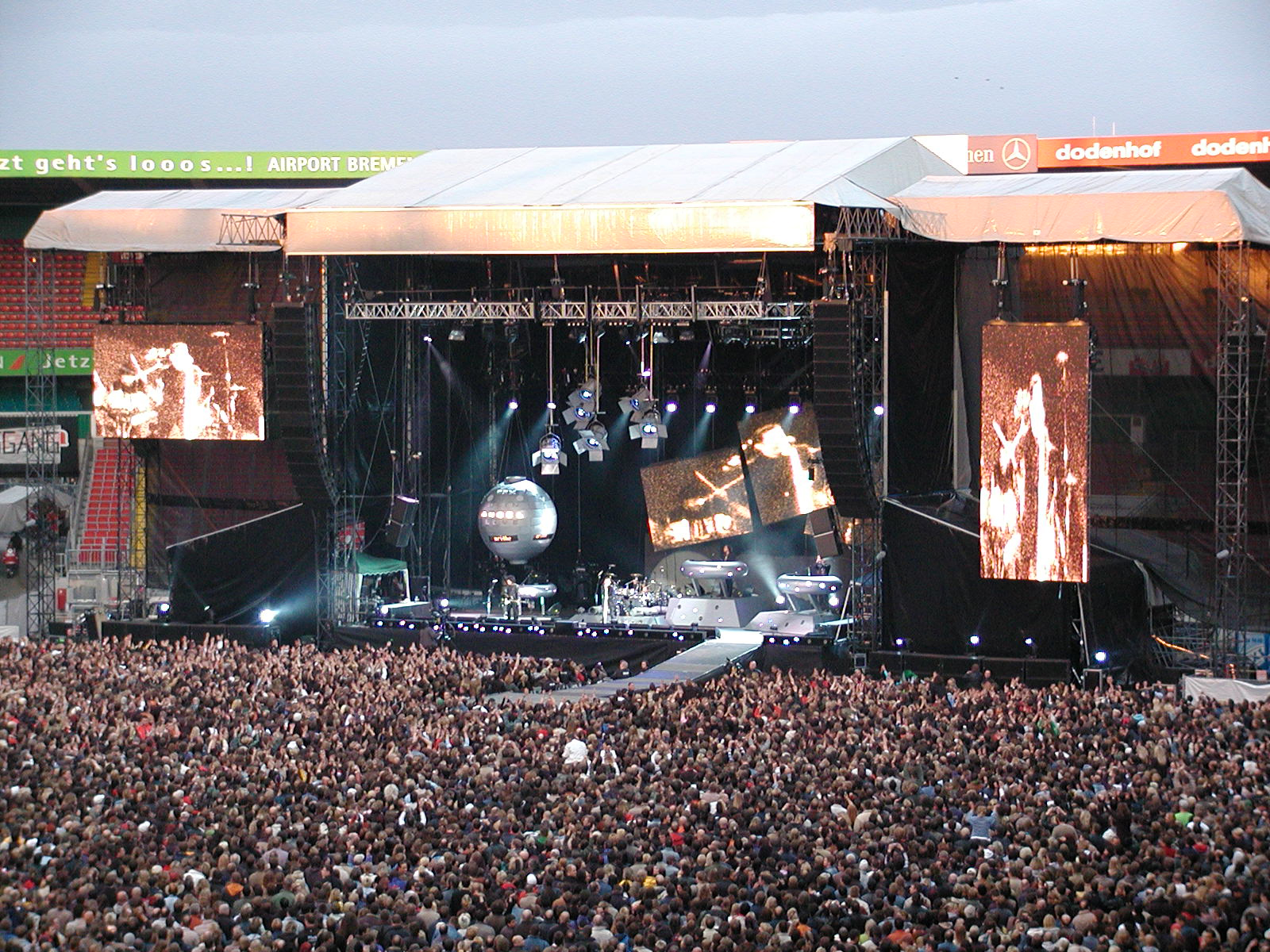 Koncert Depeche Mode v Brémách, rok 2006, Touring The Angel.